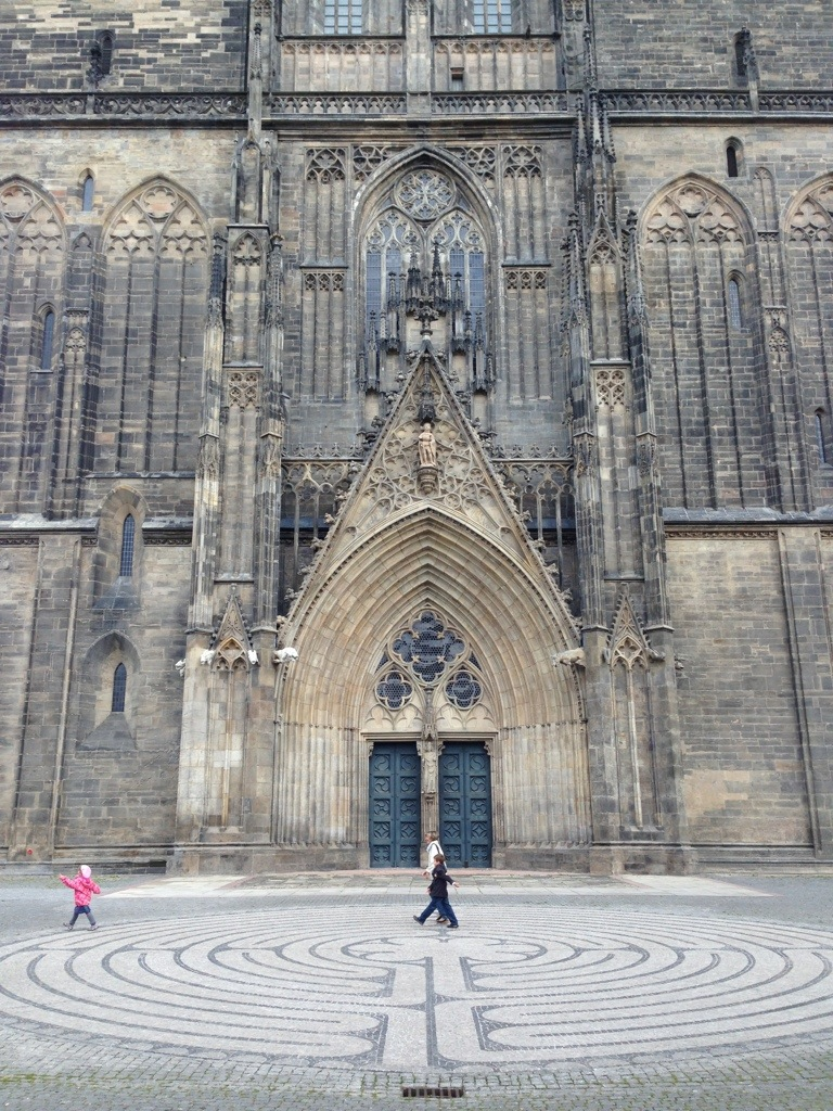 Mosaik am Magdeburger Dom (Westportal)